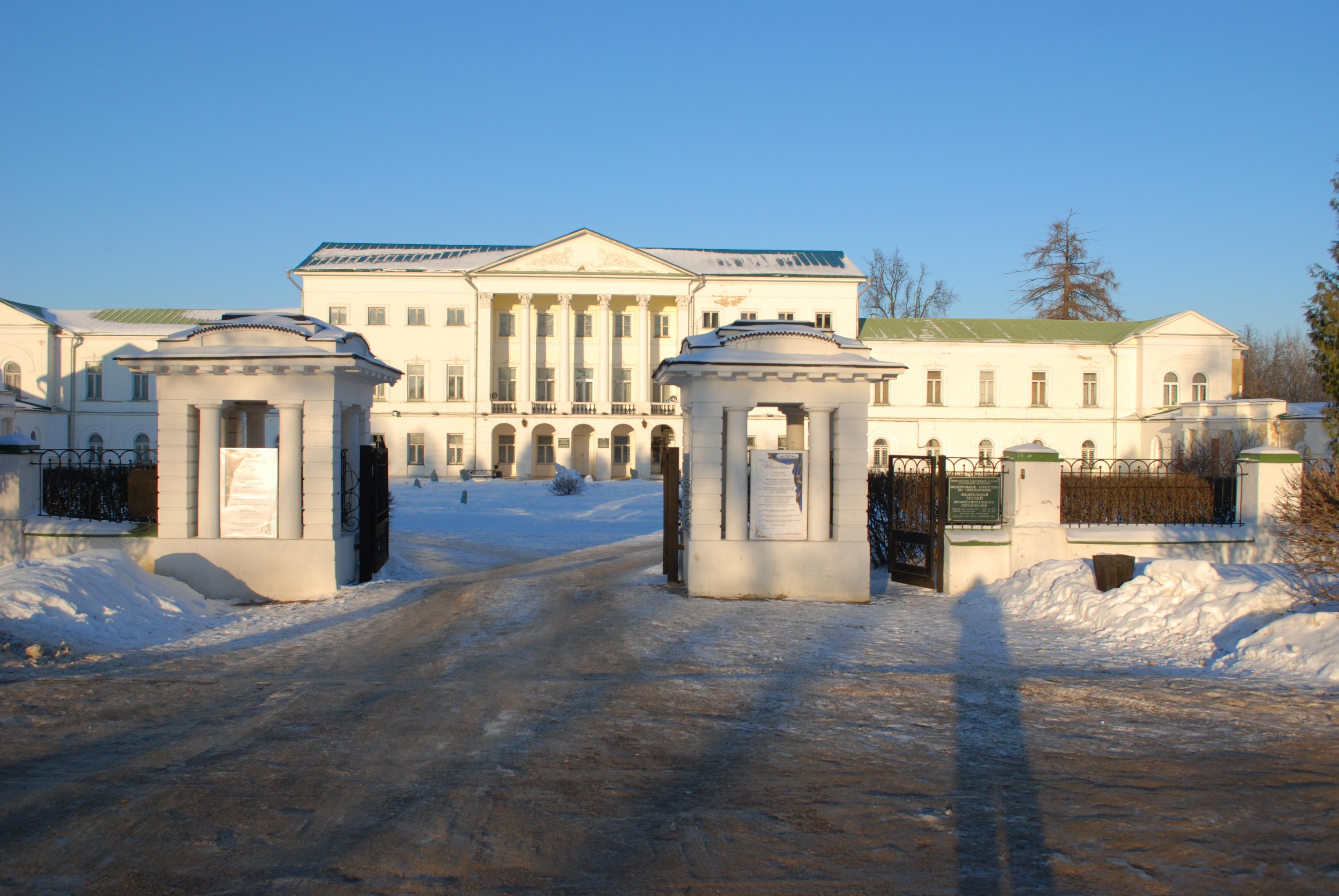 Усадьба «Ивановское» (Москва и Московская область, Подольск, посёлок Володарского (село Ивановское, Парковая улица, 1))